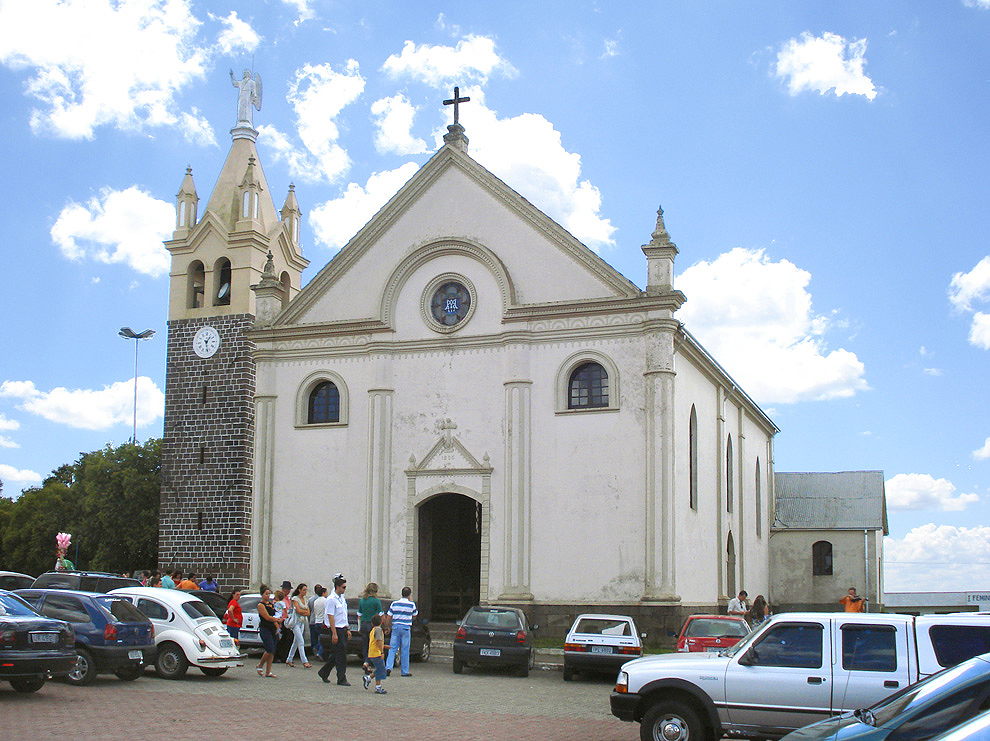 Antiga Matriz de Nossa Senhora de Caravaggio em Farroupilha, Rio Grande do Sul, Brasil